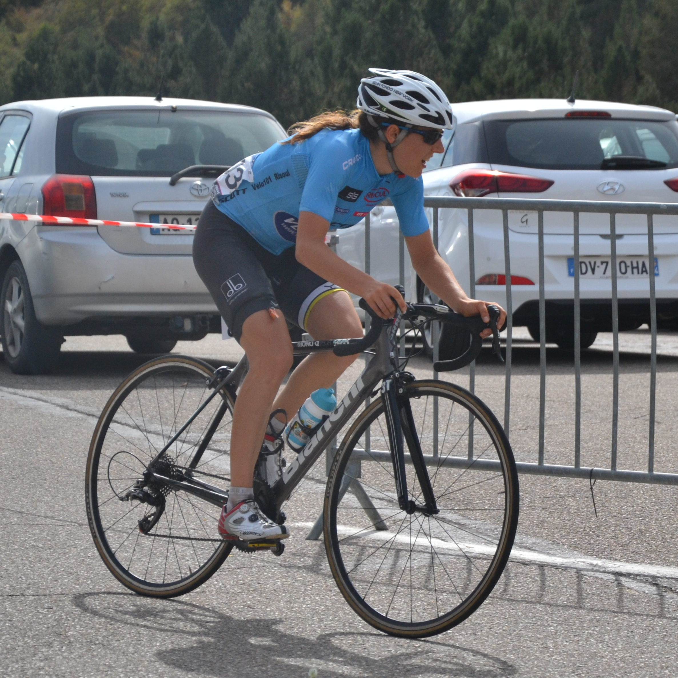 Anna Kiesenhofer, en tête de course au chalet Reynard, dans l'ascension du Mont Ventoux